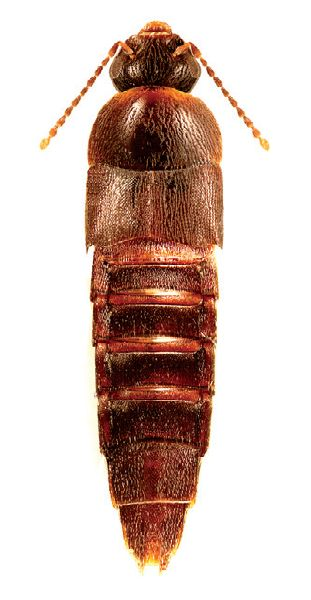 Deinopsis rhadina